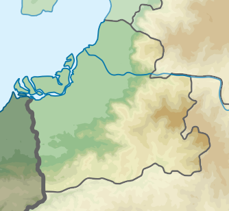 Carte topographique de la province d'El Oro, Équateur LImits : N = -2.961600 S = -3.963636 W = -80.369957 E = -79.263339